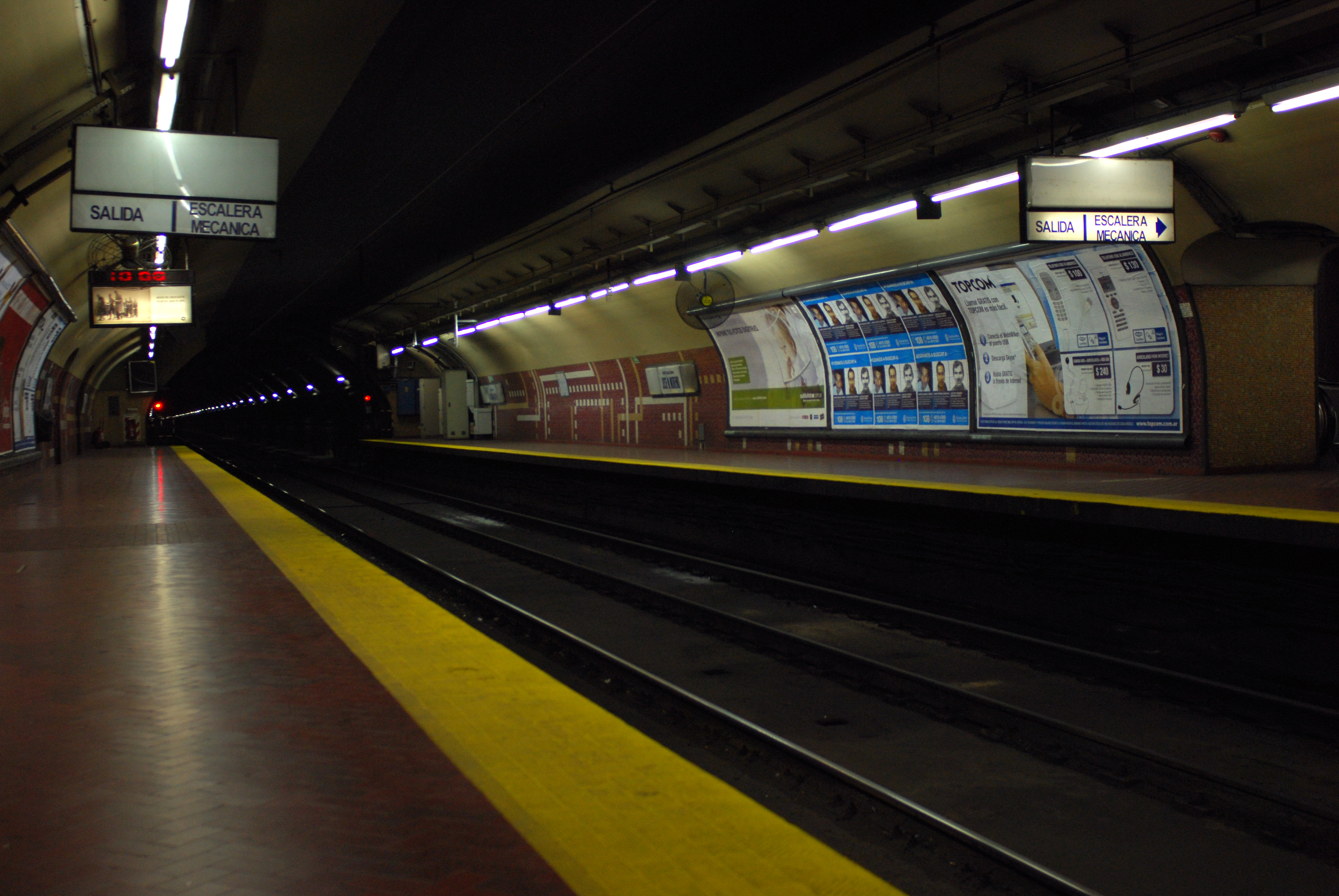 andenes de la estación José María Moreno de la línea E de subtes en Buenos Aires, Argentina